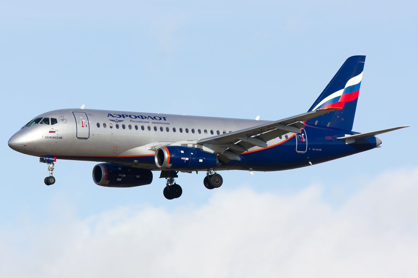 Sukhoi Superjet 100-95 (RA-89008)